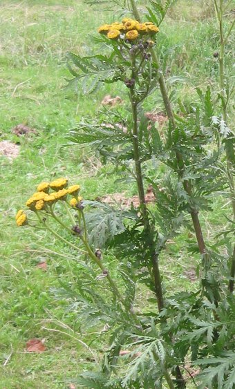 zelfgemaakte foto van Boerenwormkruid; half augustus